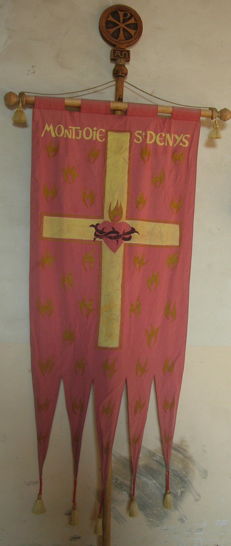 Français cadien: Oriflamme Montjoie